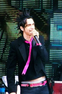 Jimmy Urine live auf einem Konzert.